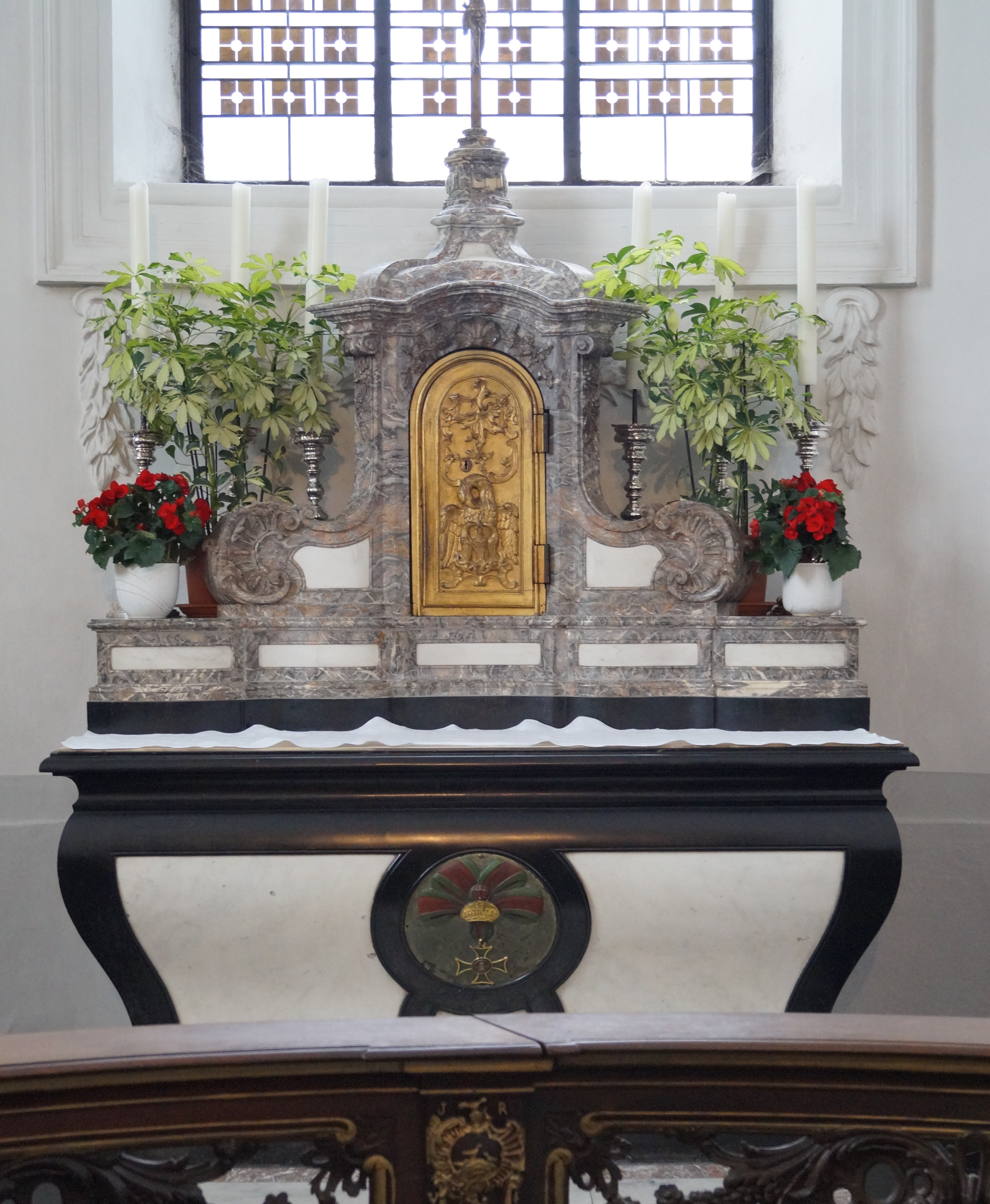 Aachener Dom Altar Ungarnkapelle